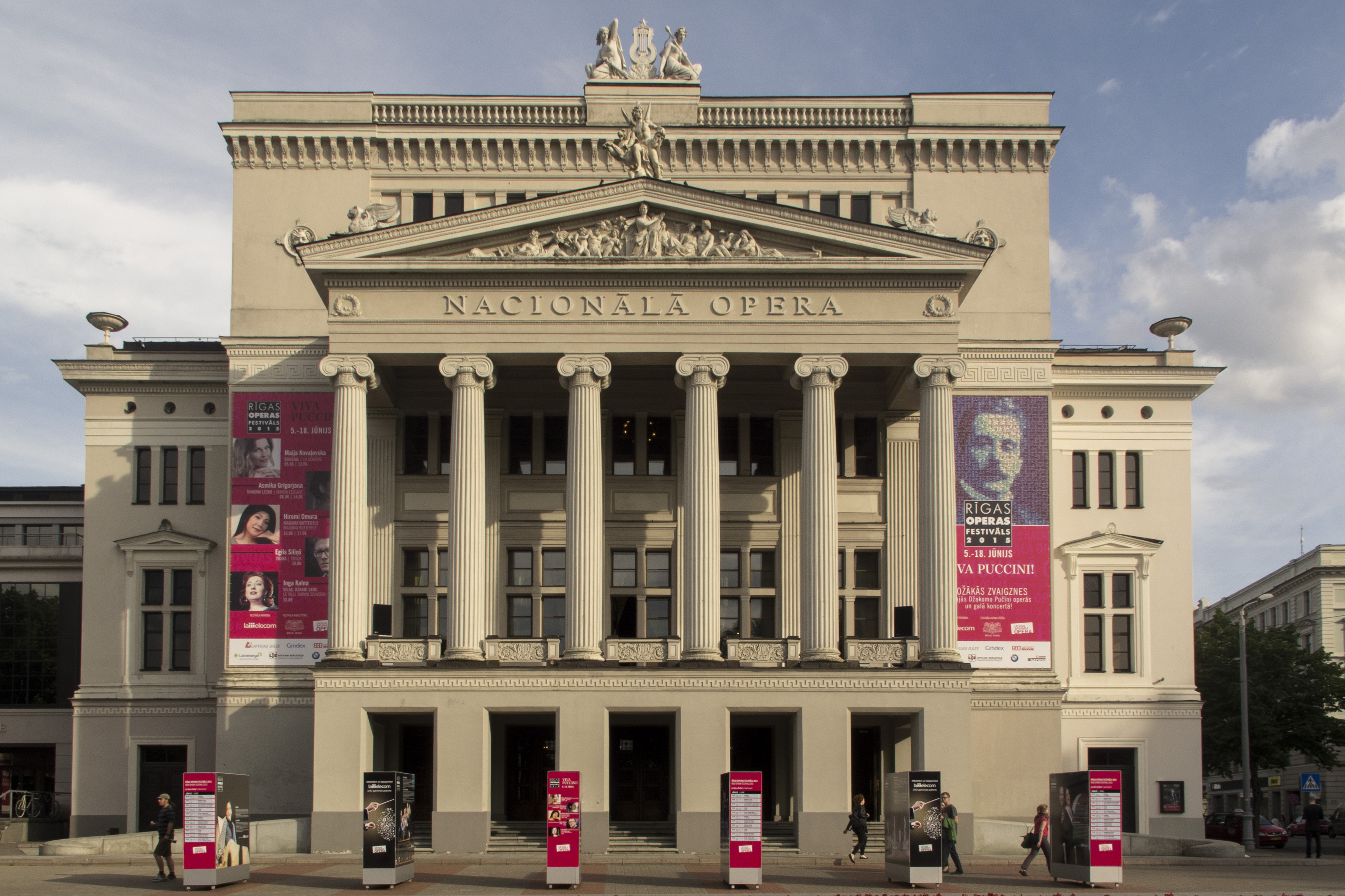 Òpera nacional de Letònia, a Riga.